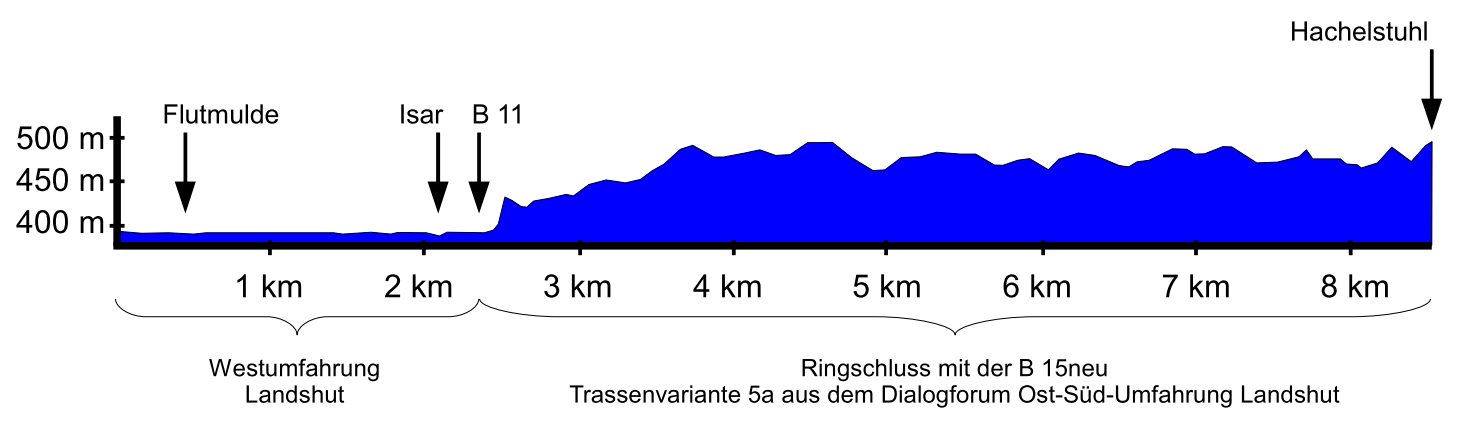 Die hierzu verwendeten Informationen und Daten zum Höhenverlauf basieren auf den Angaben der Amtlichen Topographischen Karte Bayern des Landesamtes für Vermessung und Geoinformationen. Die Lage der Westtangente Landshut bis zur B 11 wurde diversen Presseveröffentlichungen entnommen. Da der Verlauf einer Weiterführung der Westtangente Landshut als Ringschluss zur B 15neu (Ost-Süd-Umfahrung Landshut) bis Hachelstuhl bisher nicht bekannt ist, wurde dieser Bereich als Box dargestellt. Die ungefähre Lage der Trasse 5a wurde den Veröffentlichungen des Dialogforums Ost-Süd-Umfahrung Landshut entnommen